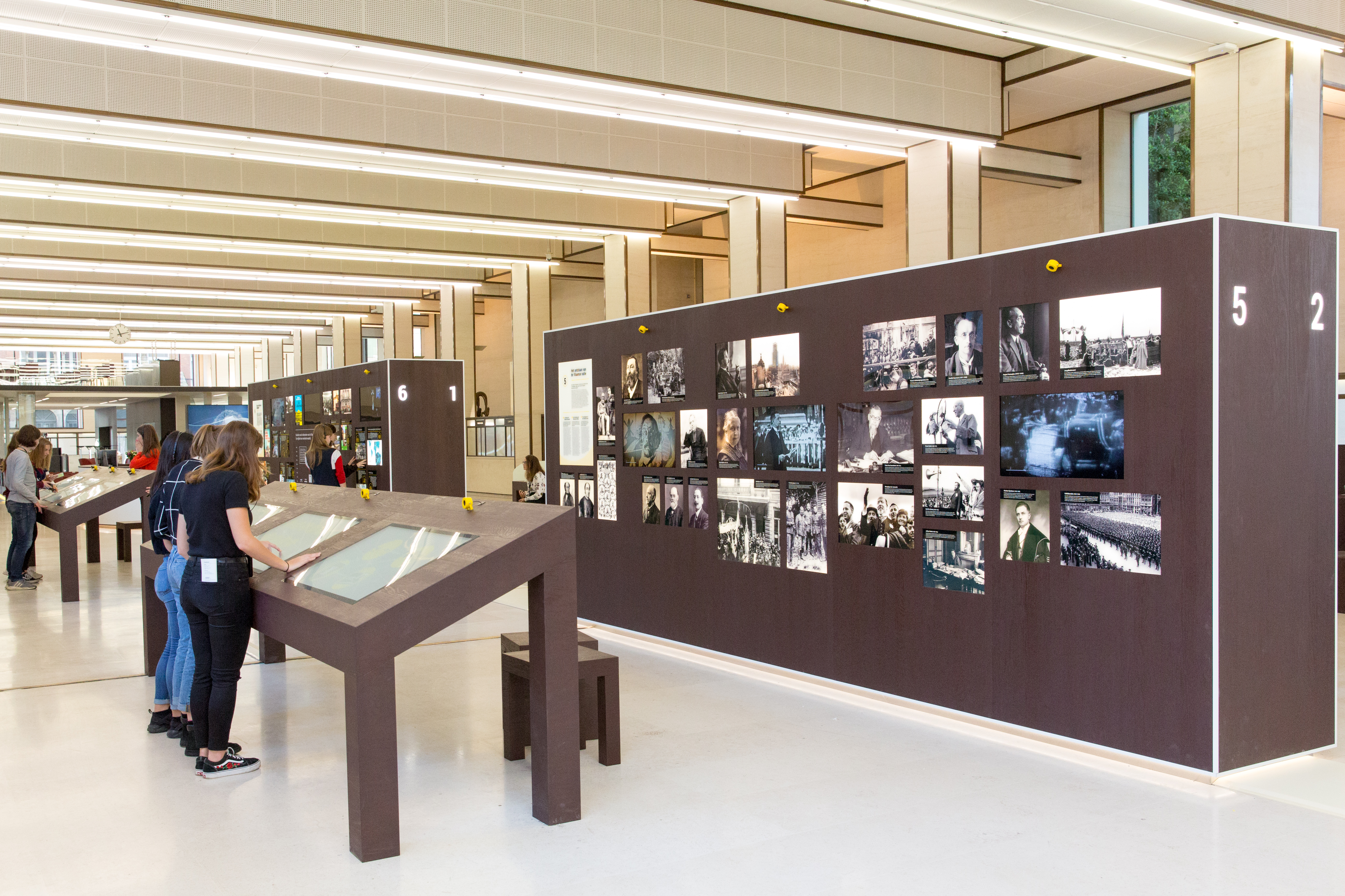 De opstelling van het Bezoekerscentrum